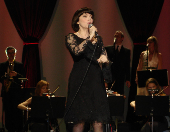 Photo prise à Cologne le 12 avril 2008 (Kölnarena 2008). Sony digital still camera 1553145. Modèle MPEGMOVIE VX DSC-W5.